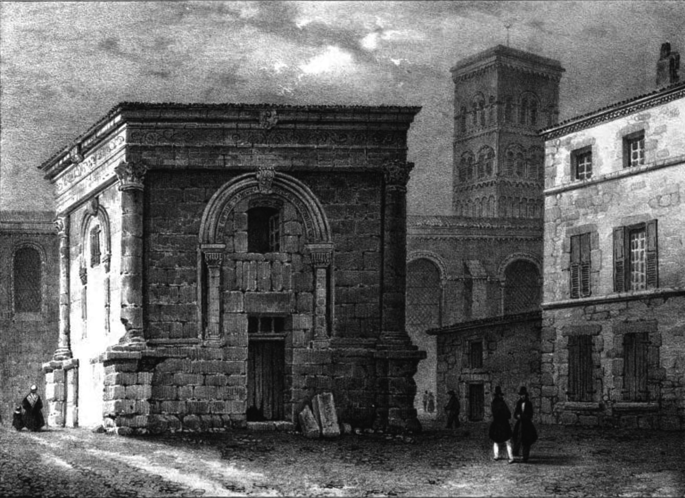 Album du Dauphiné - tome III, lithographie de Valence